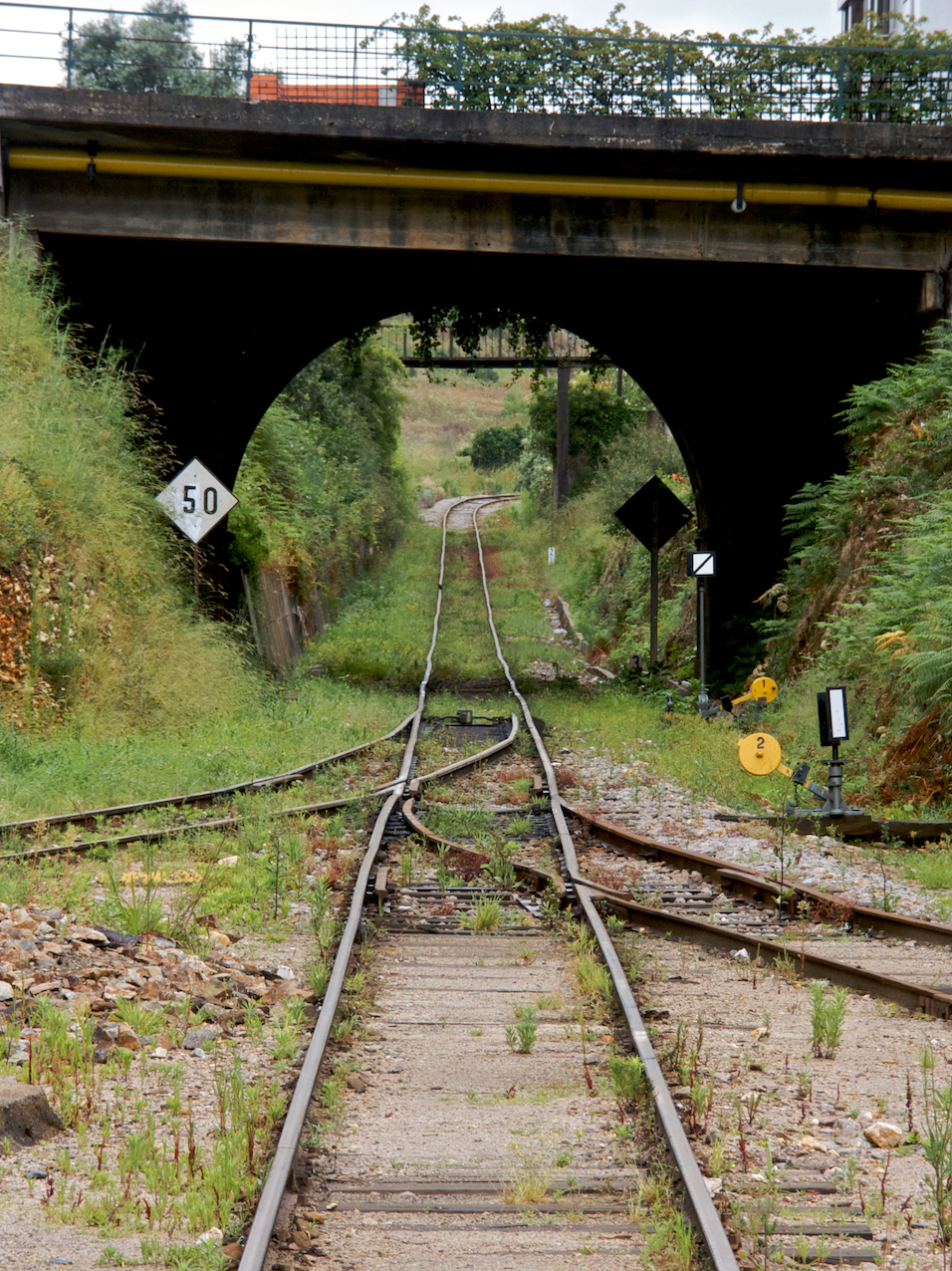 Via férrea: Linha do Vouga [PK 14] Local: Águeda Data e hora: 16 de Junho de 2008 [09h45] Sentido: Espinho